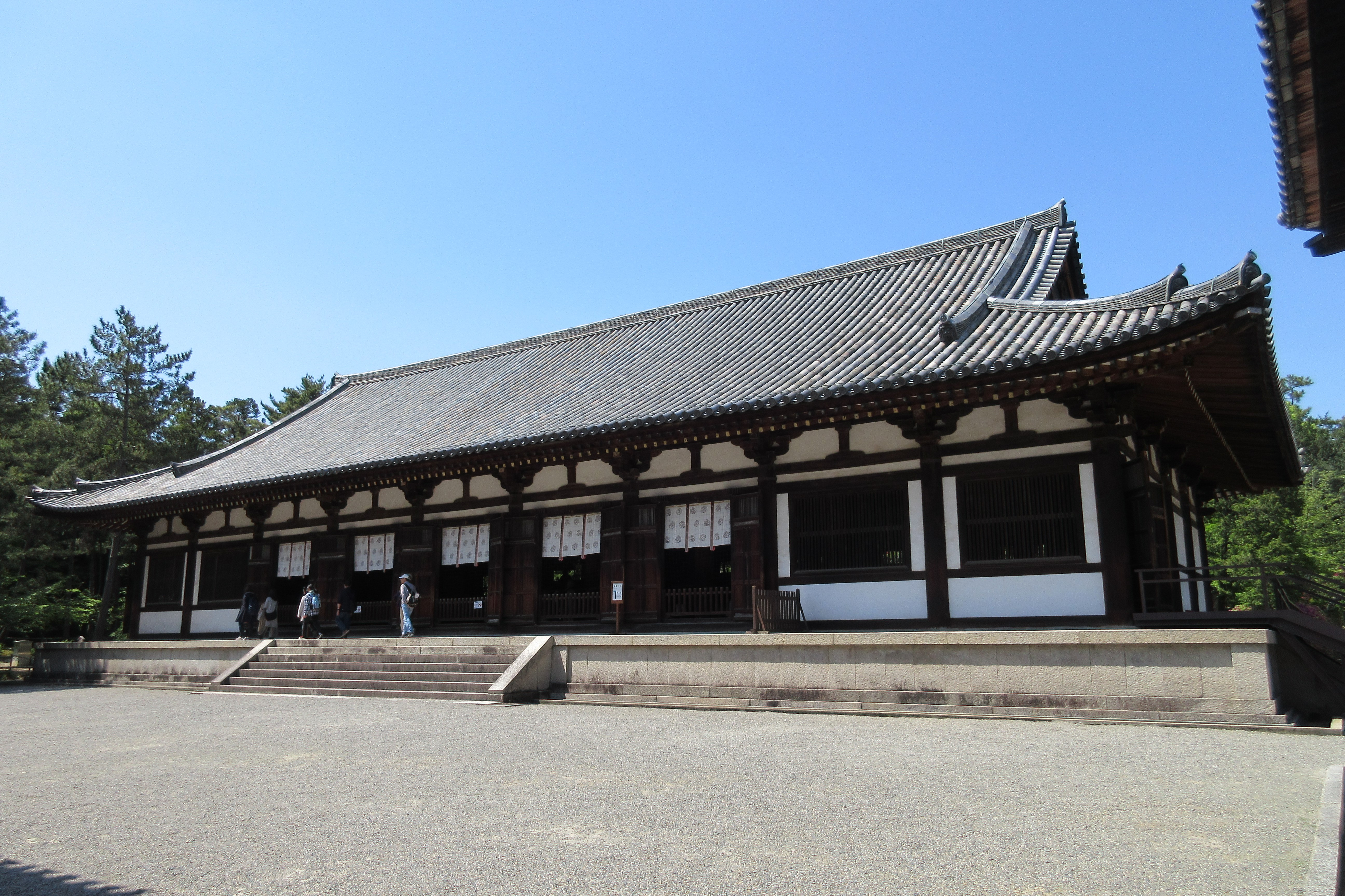 唐招提寺講堂